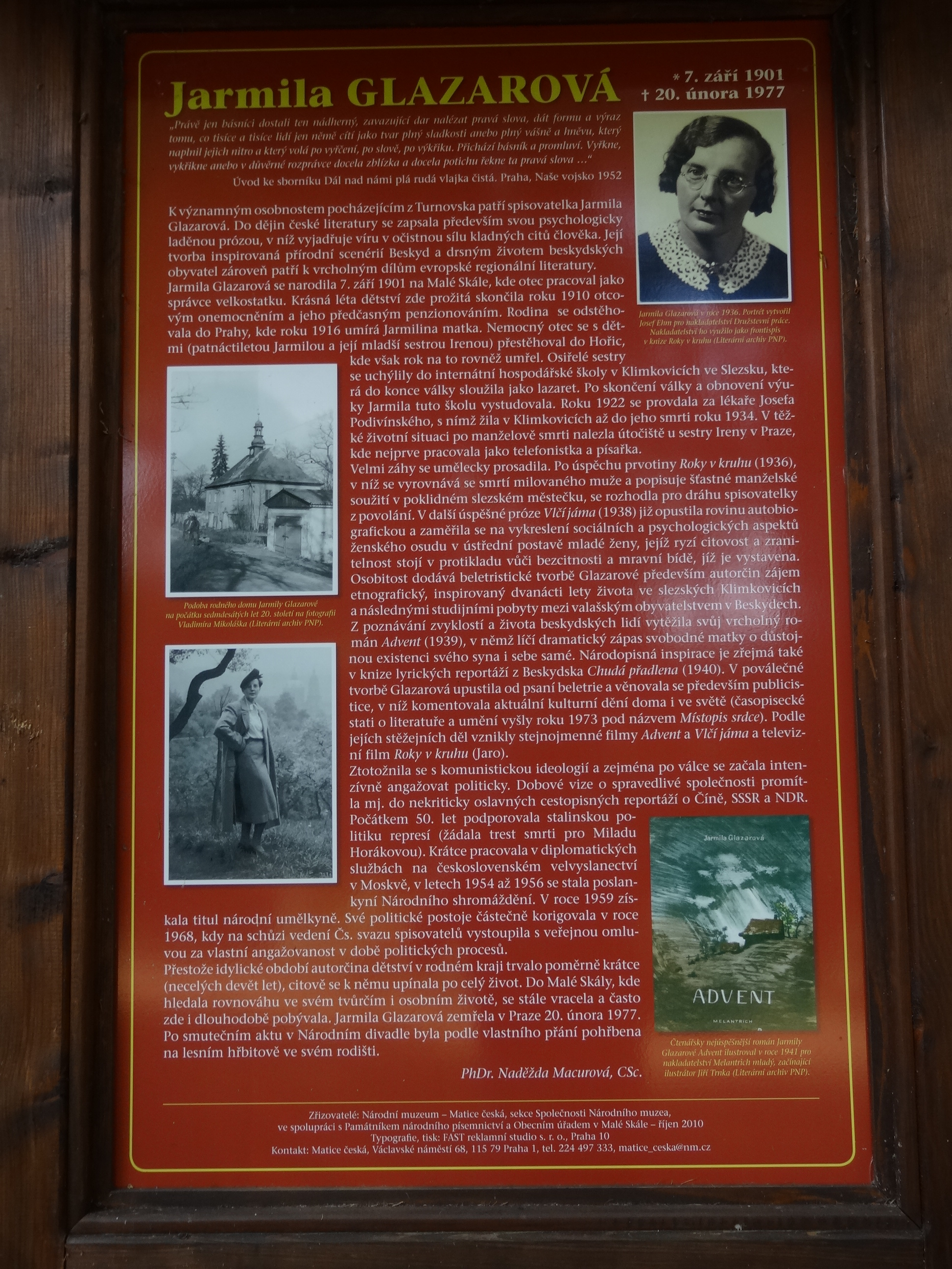 Hřbitov, na pokraji listnatého lesního porostu nad zámkem, Malá Skála - hrob Jarmily Glazarové, inf. tabule.